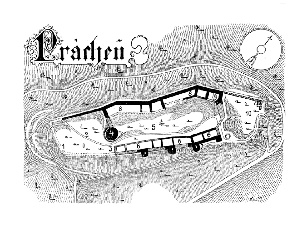 Prácheň – půdorys hradu od Vojtěch Krále z Dobré Vody publikovaný roku 1897; Popis: 1 – první brána, 2 – předhradí, 3 – druhá brána, 4 – velká věž, 5 – nádvoří, 6 – hospodářské budovy, 7 – bašty, 8 – panský dům, 9 – bývalá poustevna, 10 – příhrádek